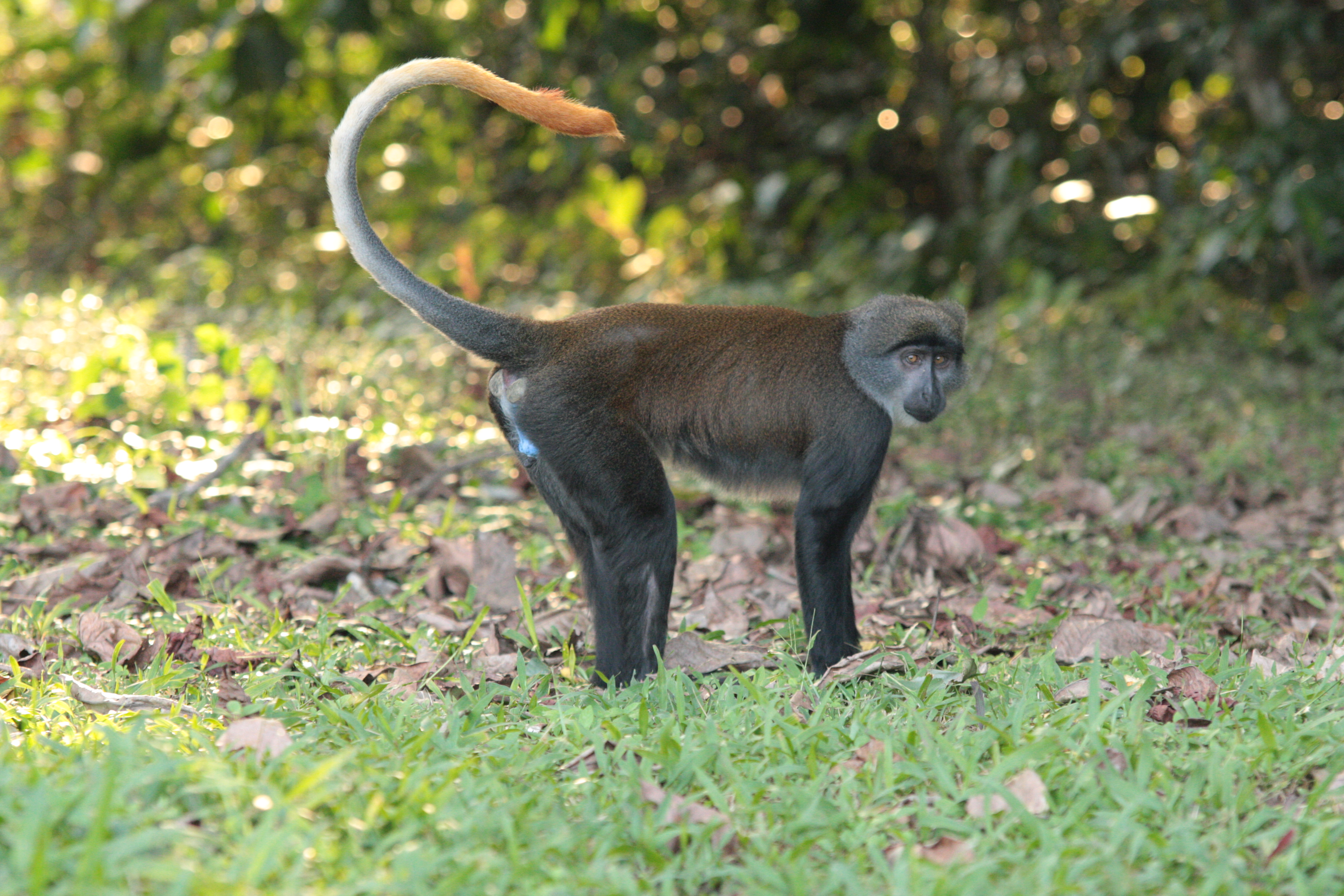 singe cercopitheque à queue de soleil, CIRMF, Gabon